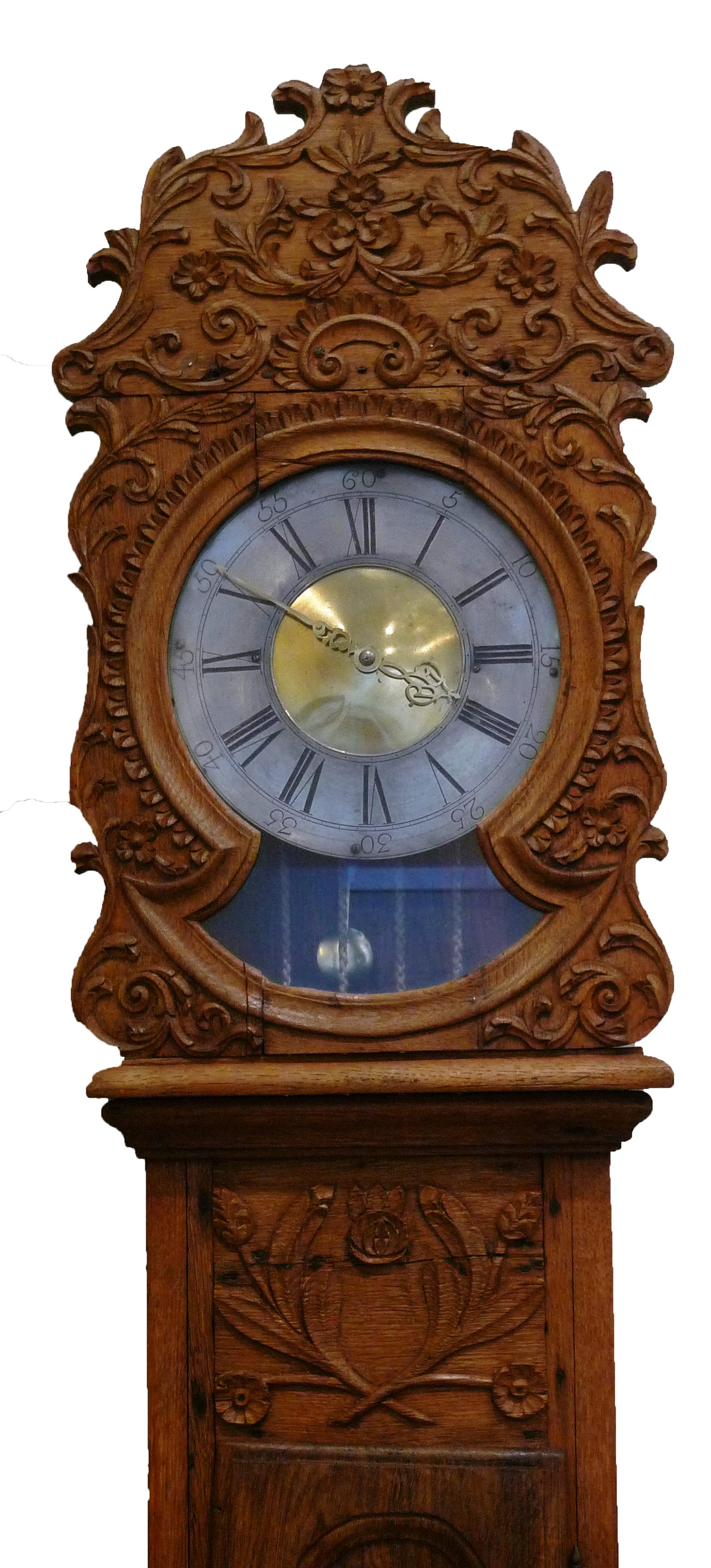 Horloge de Saint-Nicolas Milieu du 18ème siècle Collection du Musée de l'horlogerie de Saint-Nicolas d'Aliermont